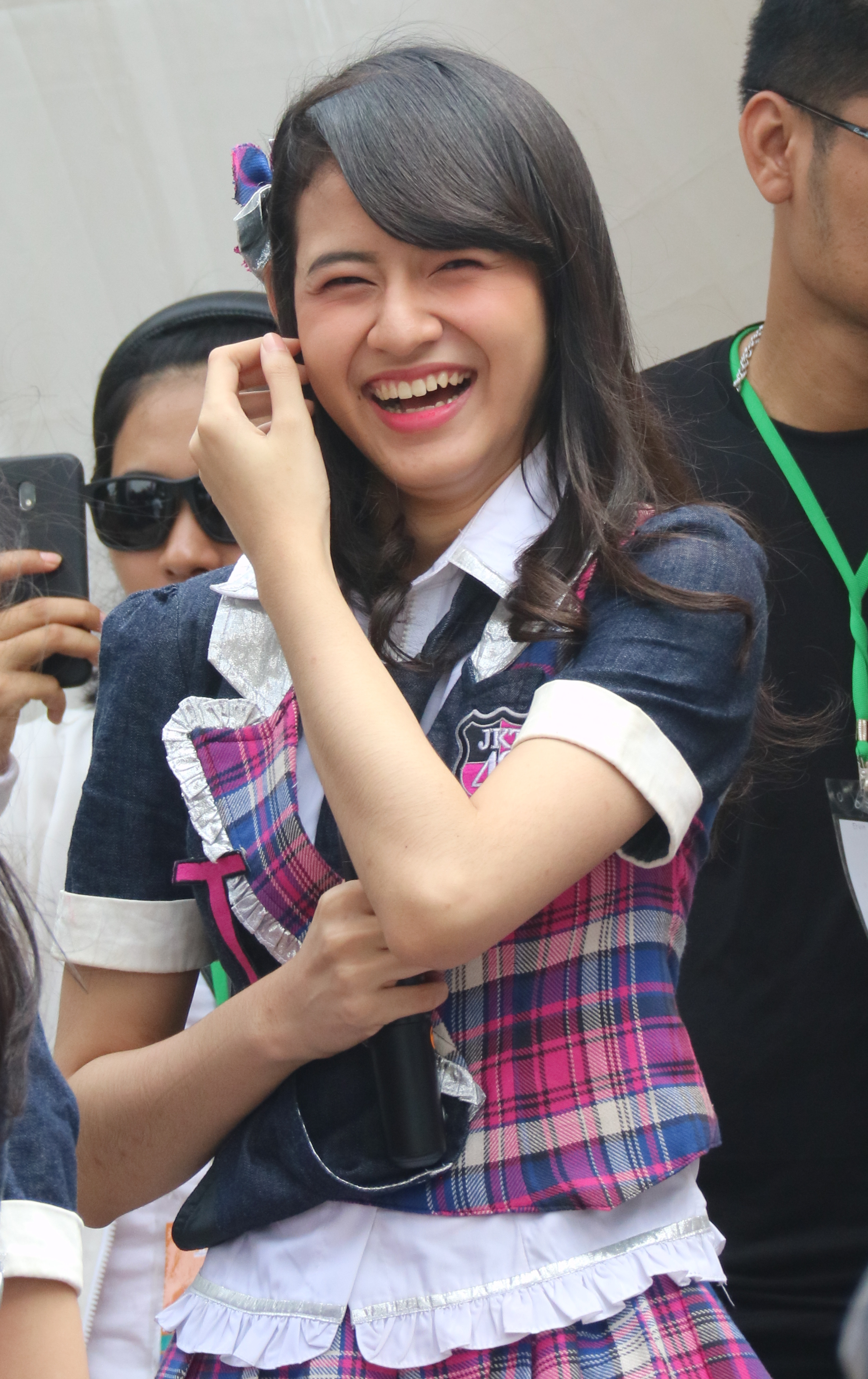 Ayu Safira Oktaviani at Metland Fun Run Ancol 2019